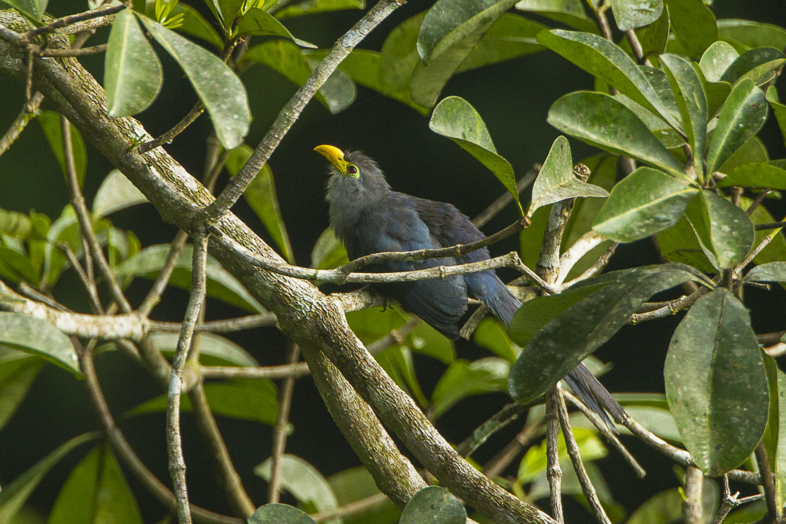 Ceuthmochares aereus